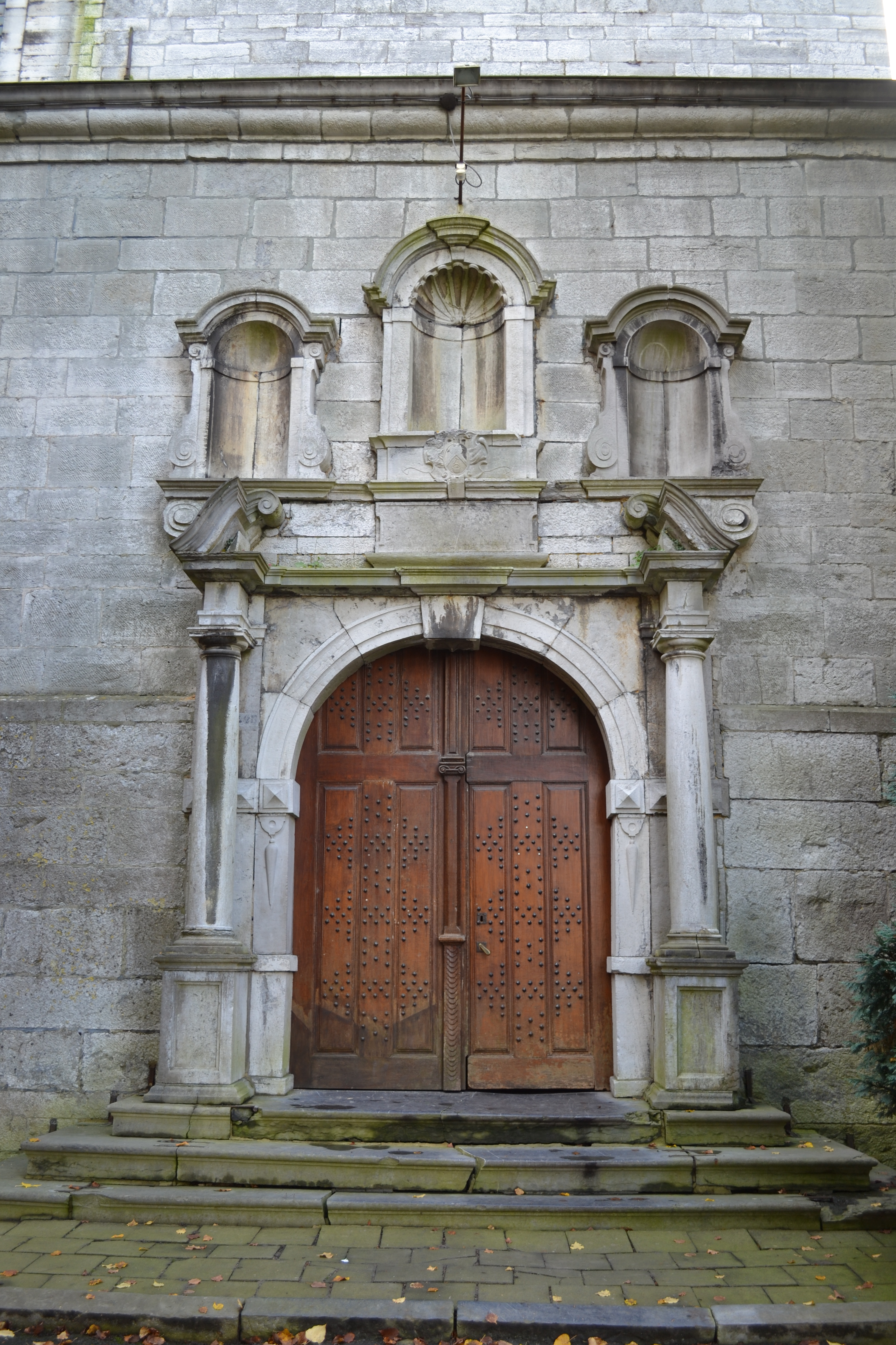 Malonne. Église St Berthuin. Portail baroque. 2011( Axel Colaux).